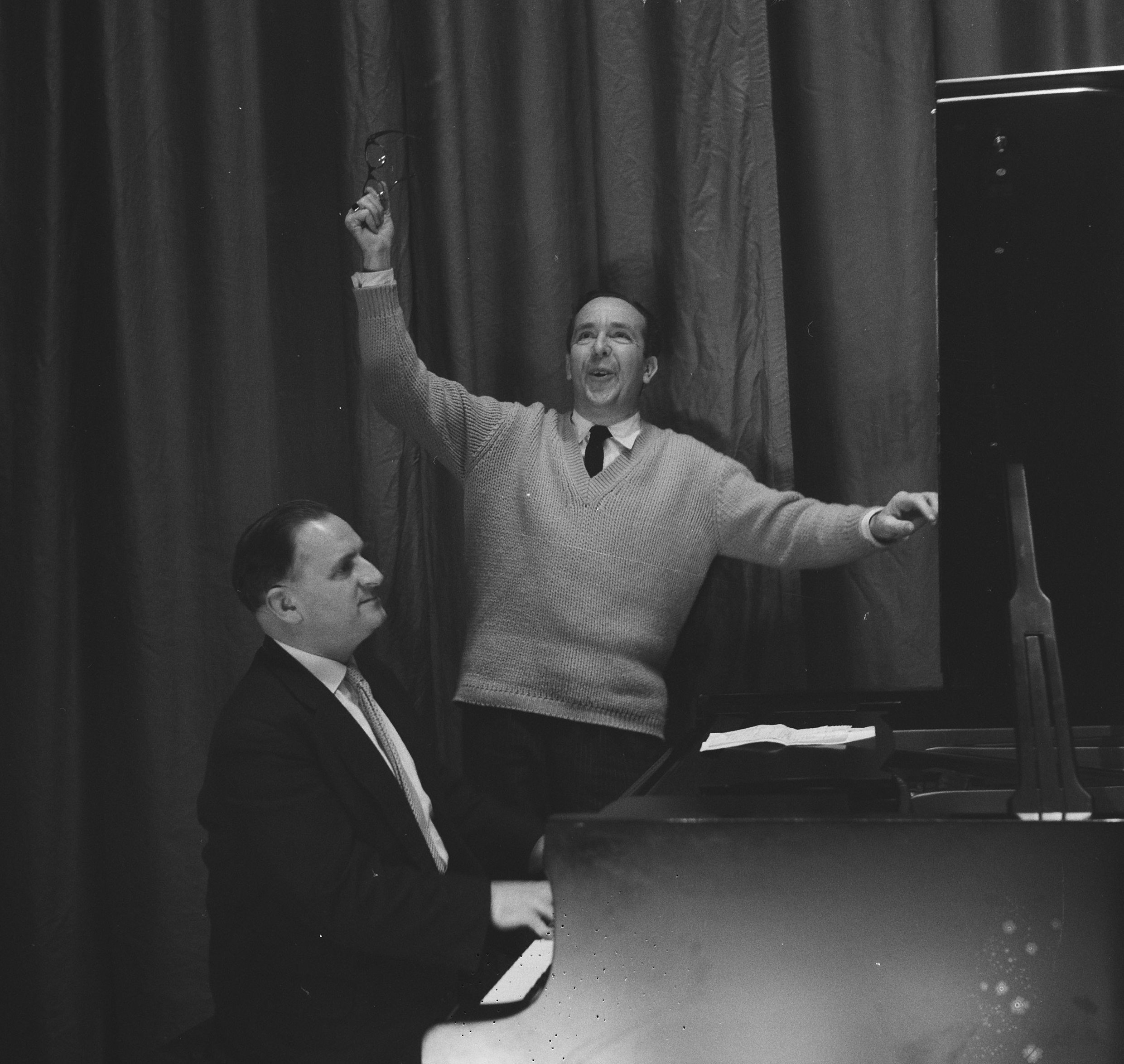 Collectie / Archief : Fotocollectie Anefo Reportage / Serie : [ onbekend ] Beschrijving : Repetitie Wim Kan voor zijn oudejaarsprogramma Datum : 31 december 1960 Trefwoorden : oudejaarsprogrammas, repetities Persoonsnaam : Kan, Wim Fotograaf : Rossem, Wim van / Anefo Auteursrechthebbende : Nationaal Archief Materiaalsoort : Negatief (zwart/wit) Nummer archiefinventaris : bekijk toegang 2.24.01.03 Bestanddeelnummer : 911-9261